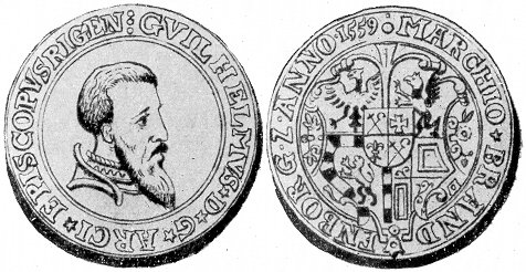 Riia peapiiskop Wilhelmi näopildiga taaler aastast 1559